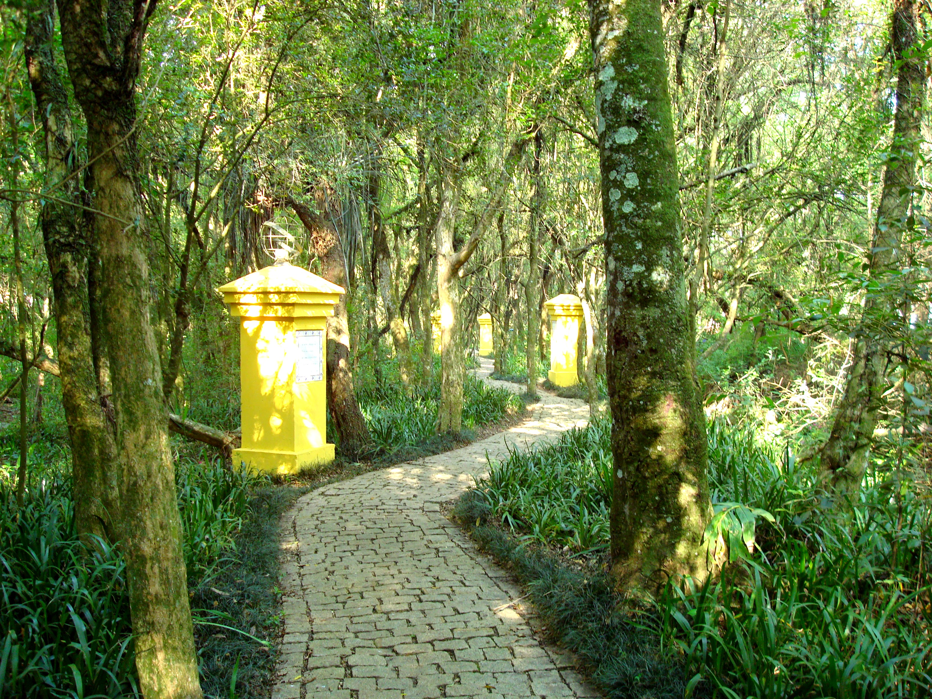 Aladema de pedra do Bosque de Portugal, Curitiba, Brasil.